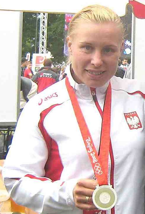 Beata Konieczna, kajakarka